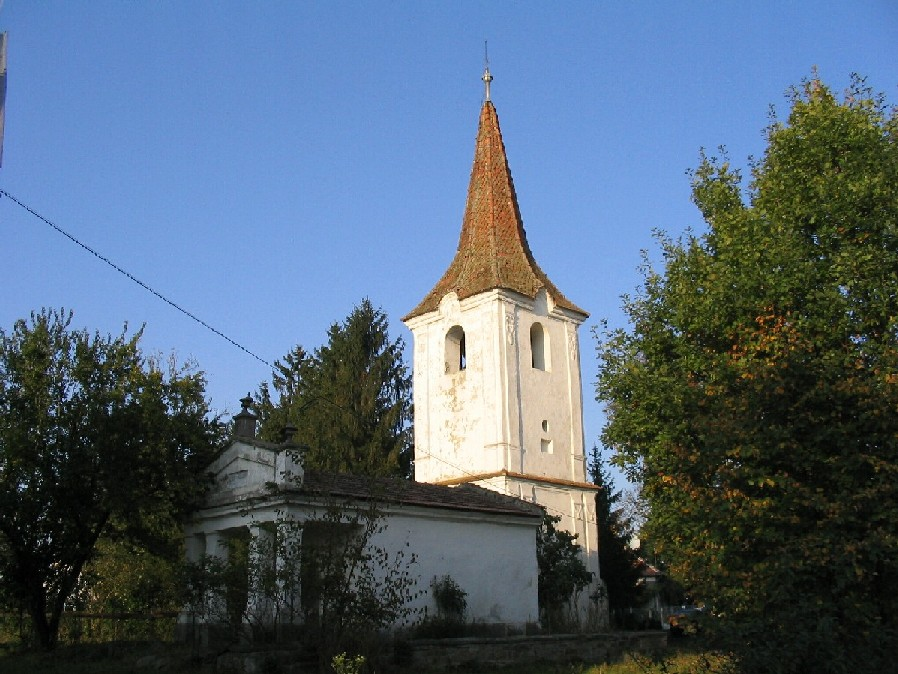 Kökösi unitárius templom, 2005